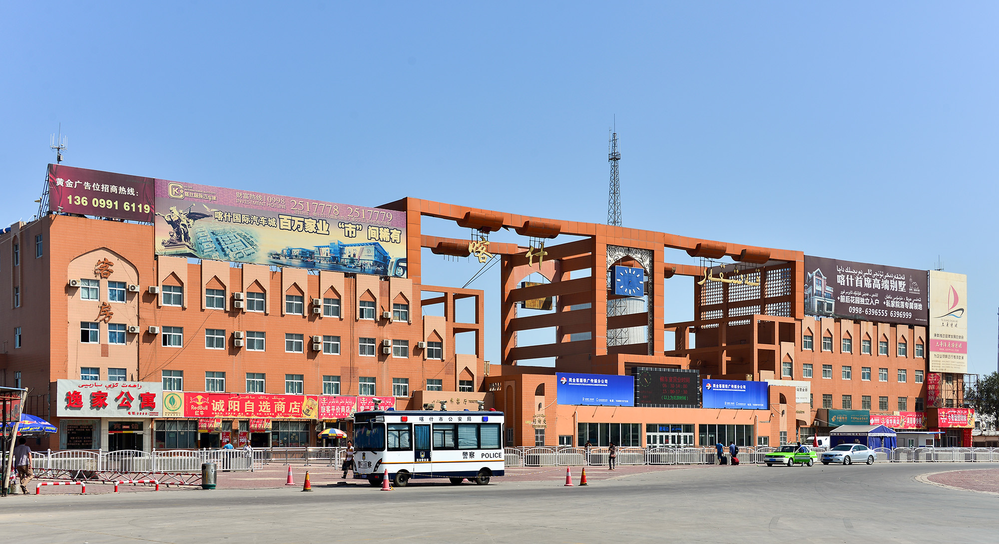 新疆维吾尔自治区喀什站